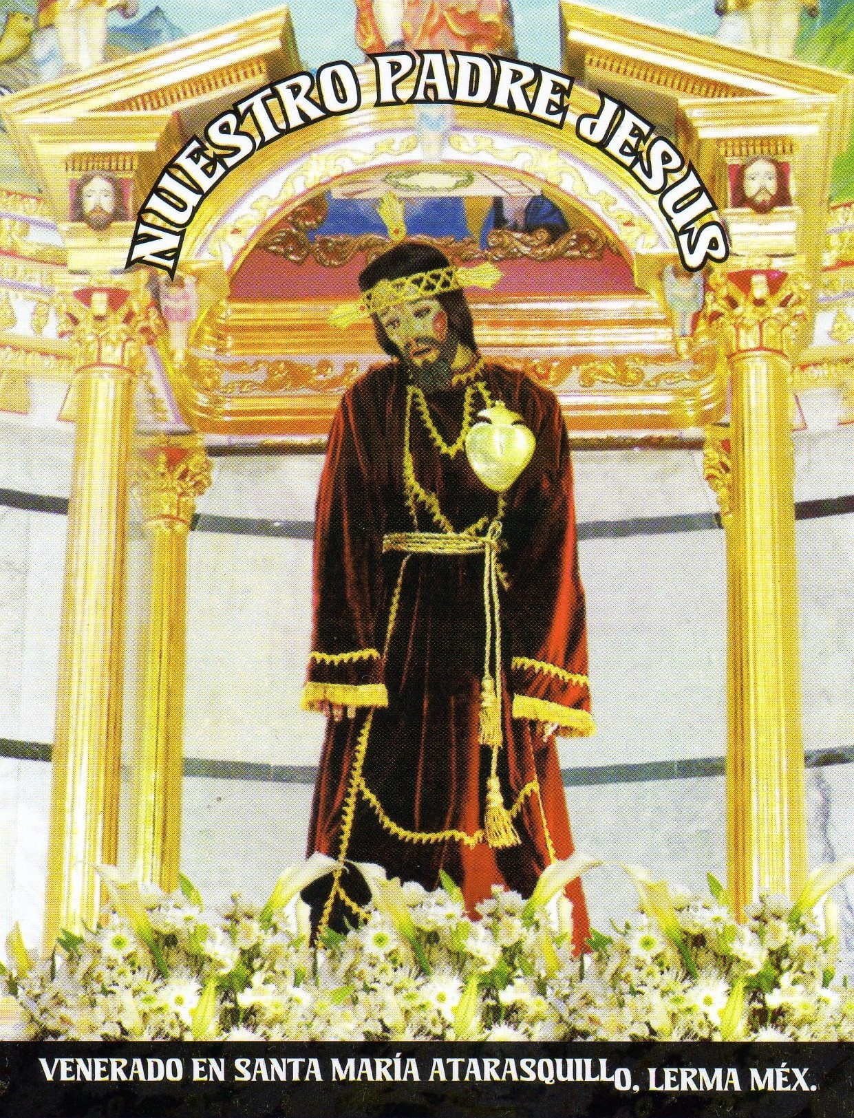 padre jesus atarasquillo